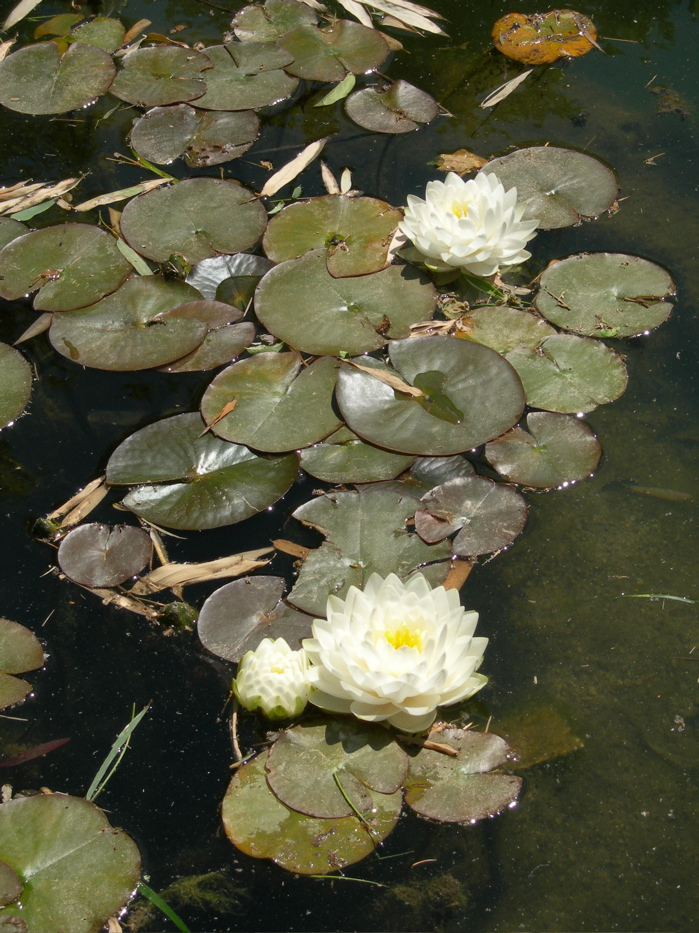 Nénuphars à la bambouseraie de Prafrance.